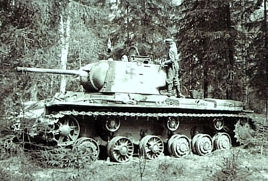 KV-1 "Klimi"